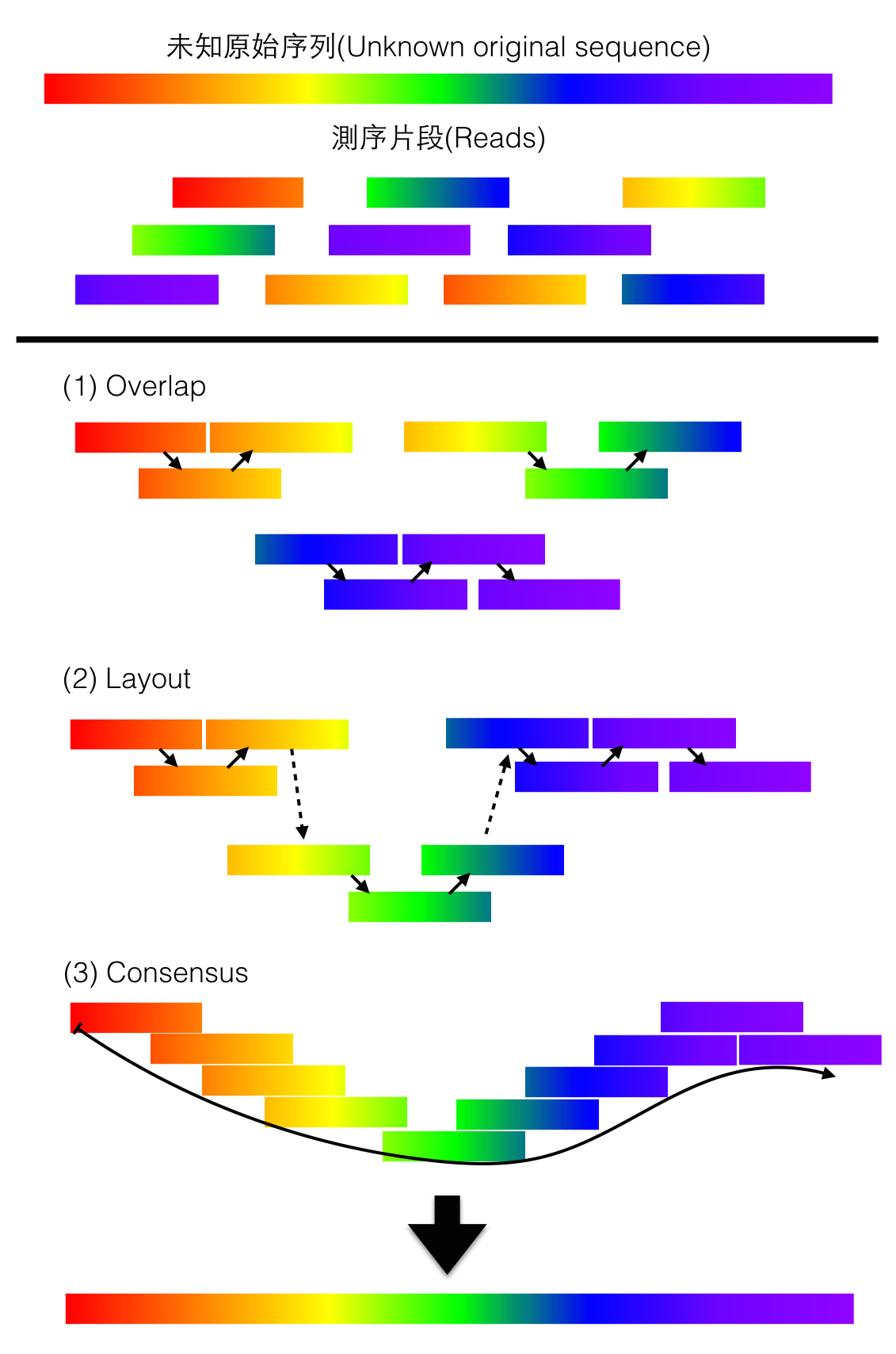 序列組裝方法